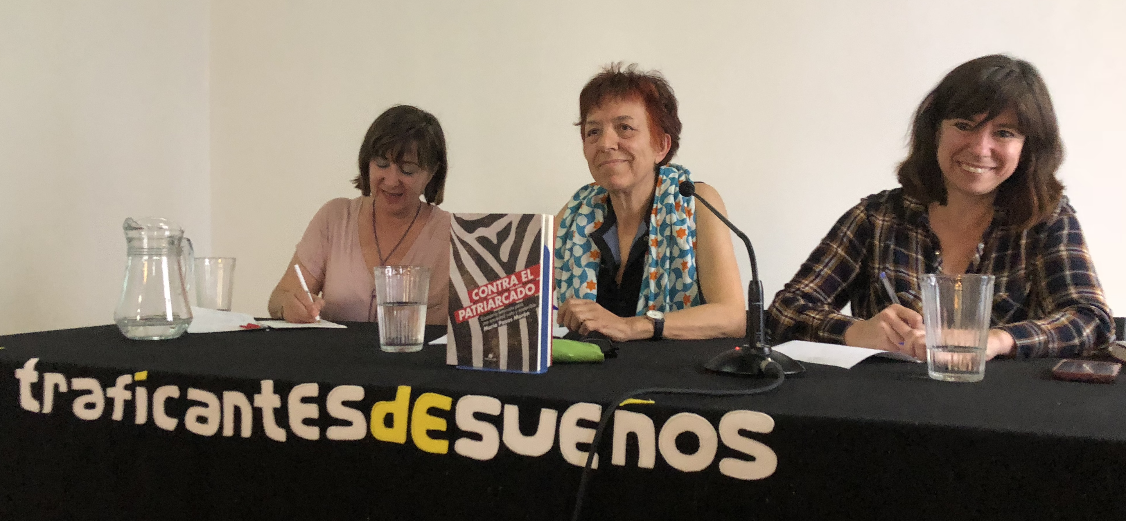 En la librería Traficantes de Sueńos